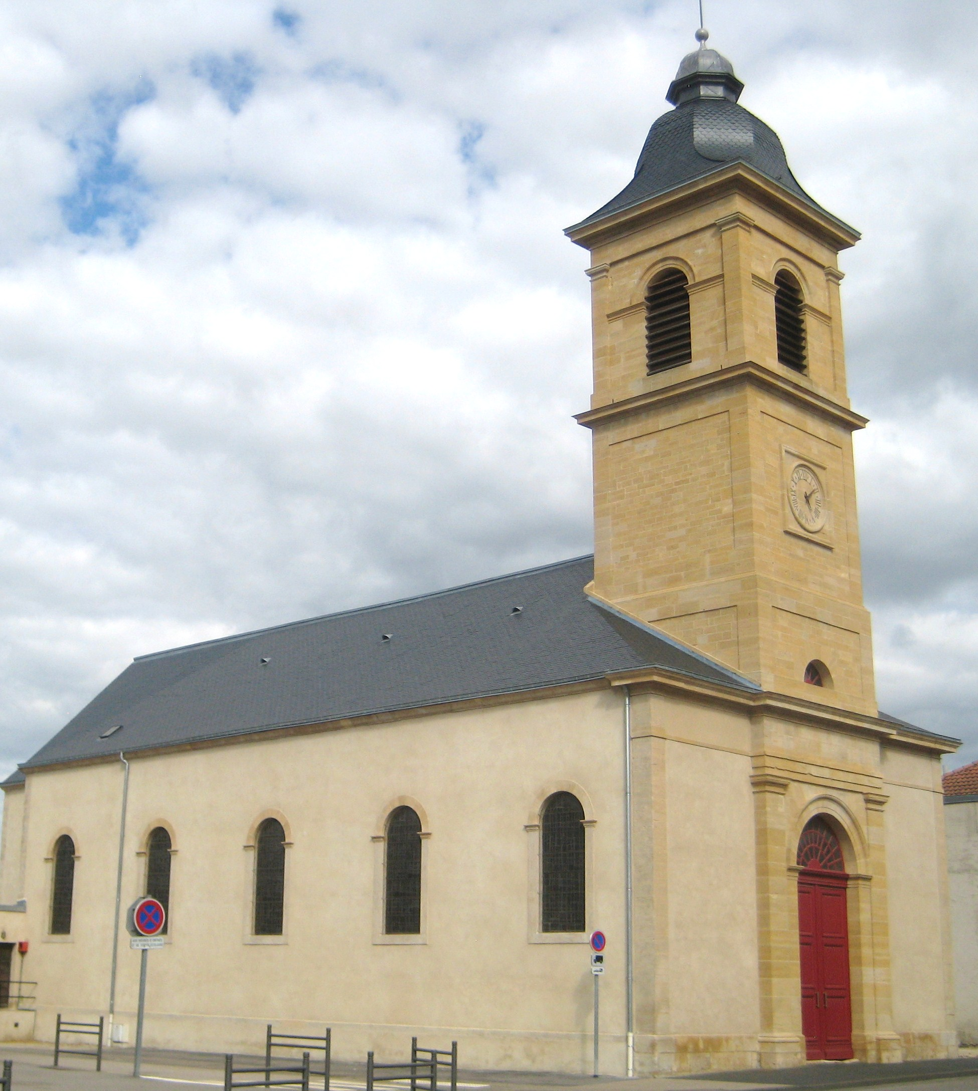 Description eglise Conflans en Jarnisy eglise Conflans en Jarnisy